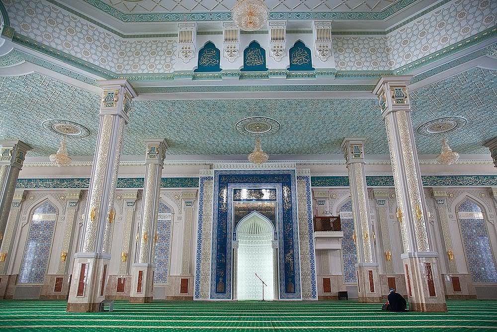 Оформление Центральной мечети внутри в г. Караганде